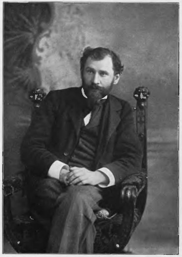 Portret Stanisława Przybyszewskiego